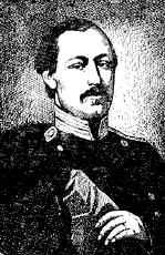 Поэт А.А.Фет в годы службыUnknown russian poet afanasy fet in 1840s